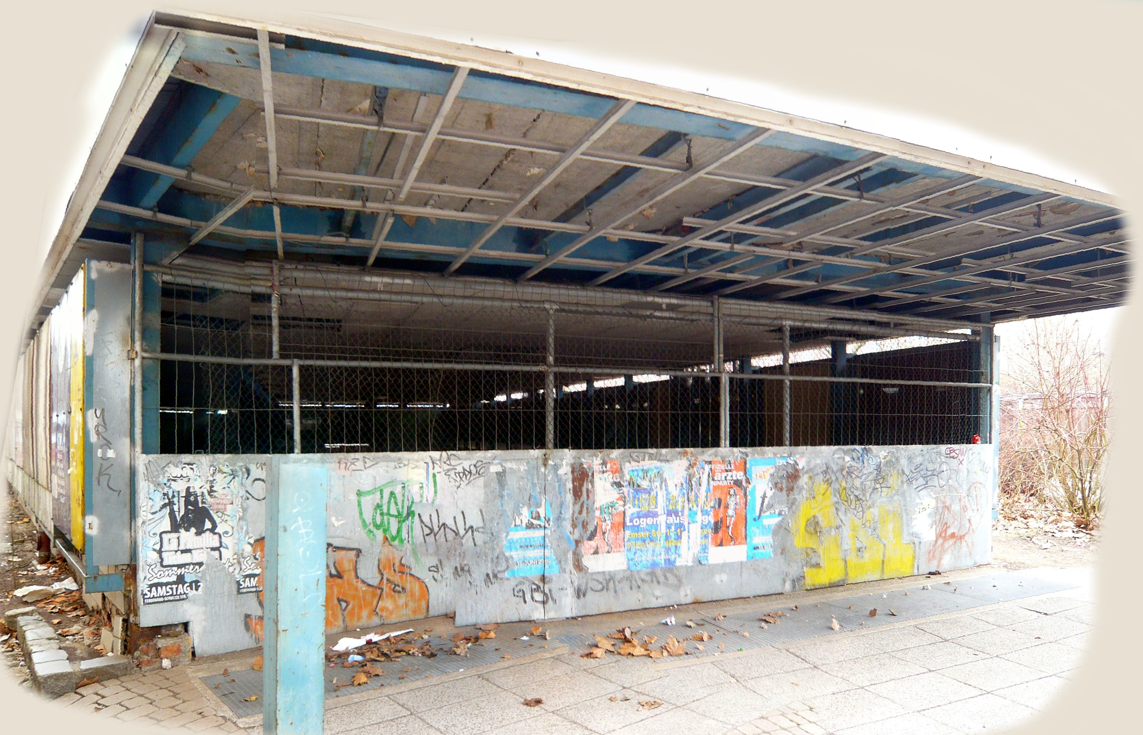 Berlin-Fennpfuhl, Abriss Tunneleingang auf der Westseite der Straße